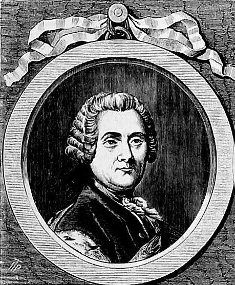 Józef Ossoliński